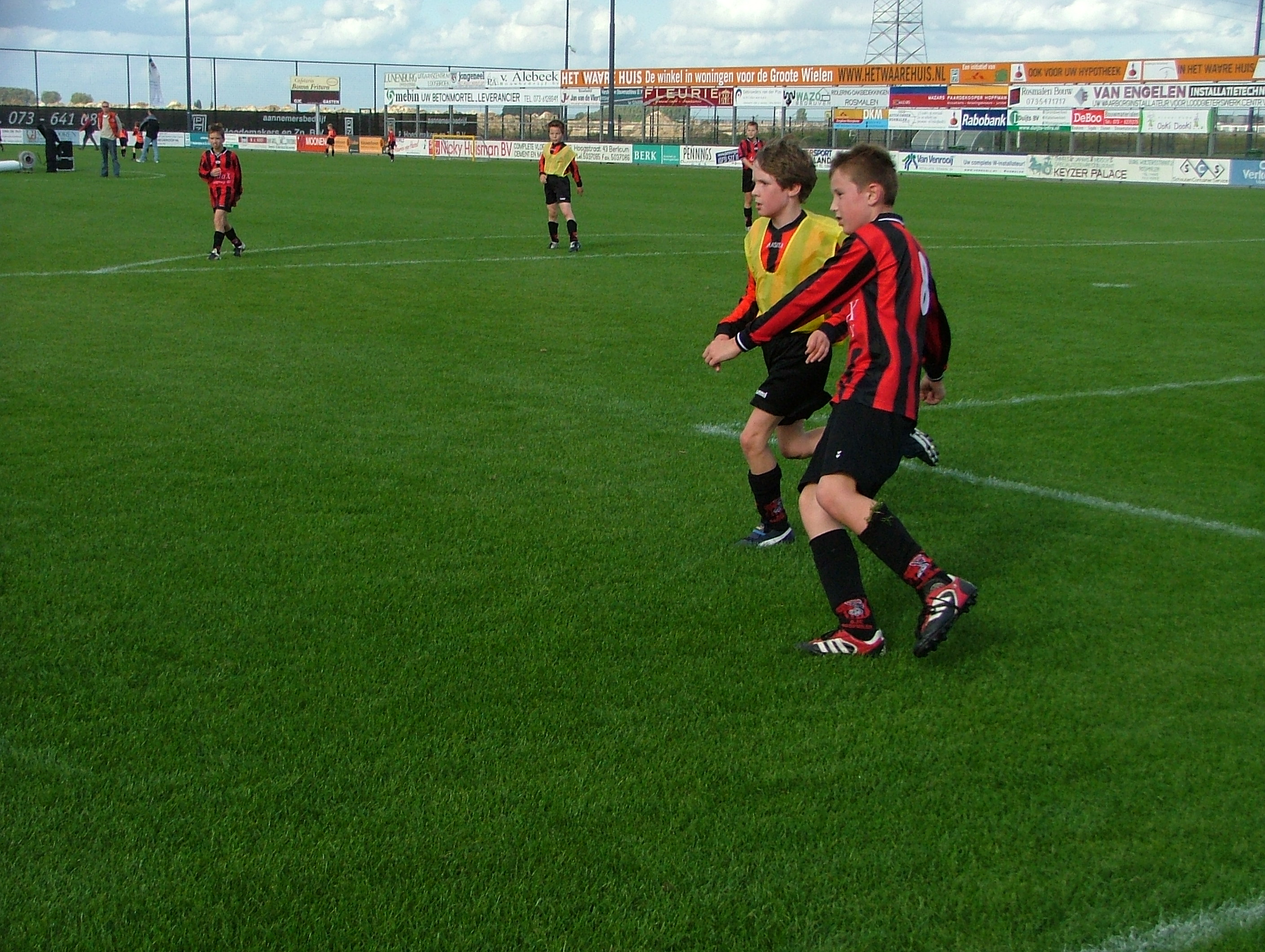 Wedstrijd op Sportpark De Groote Wielen